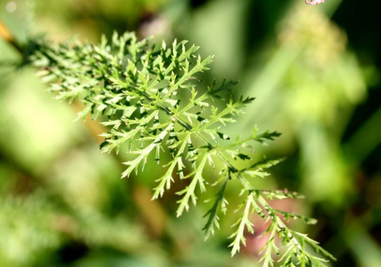 Achillea millefolium (foglie)